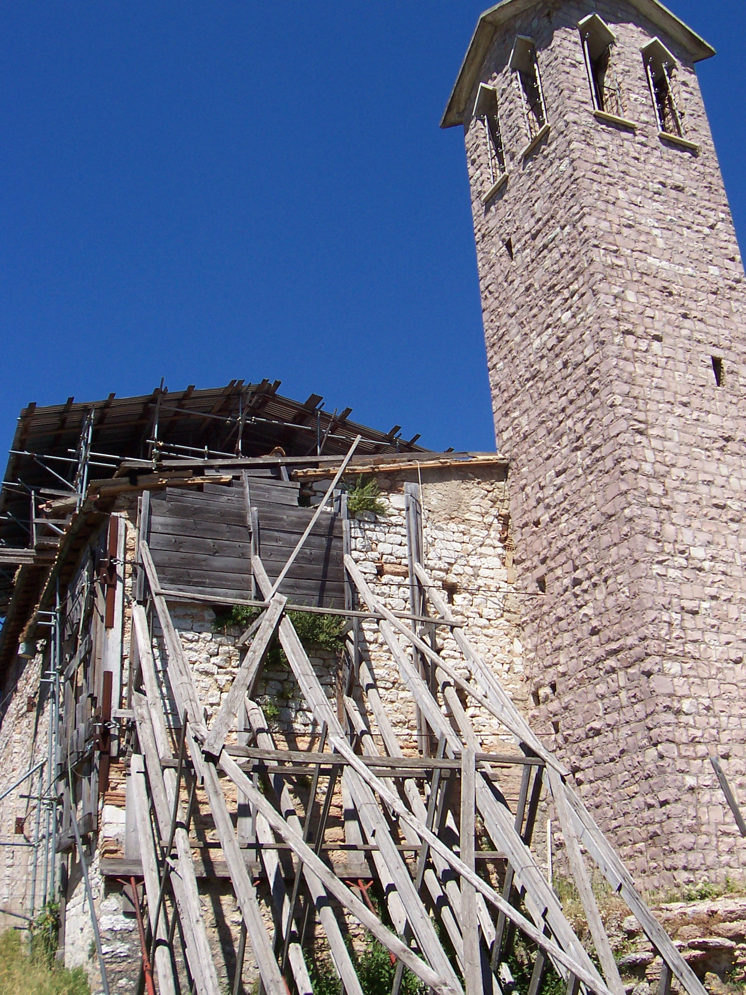 Categoria:Immagini Foligno frazioni